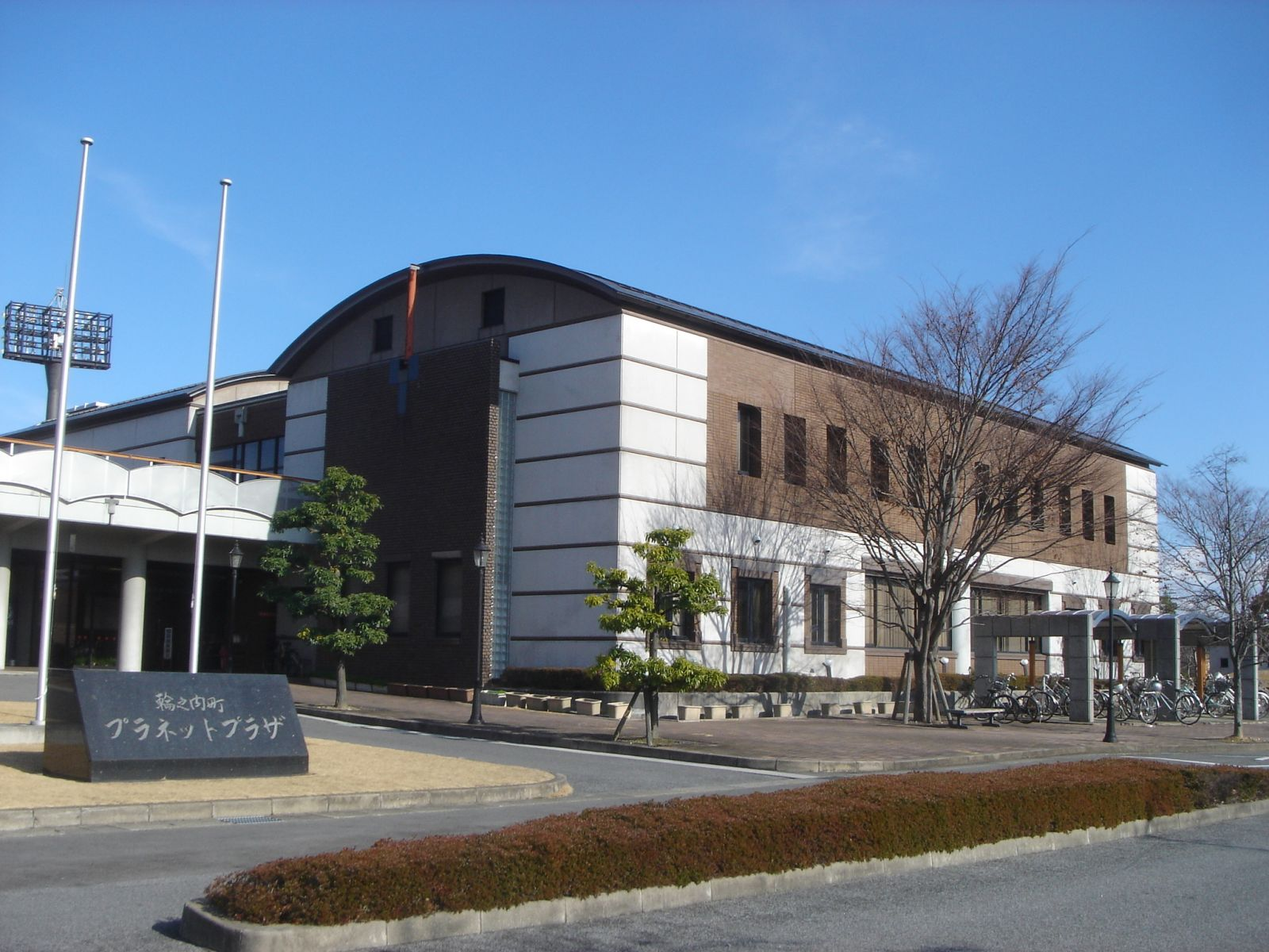 輪之内町立図書館・歴史民俗資料館(輪之内町プラネットプラザ内)